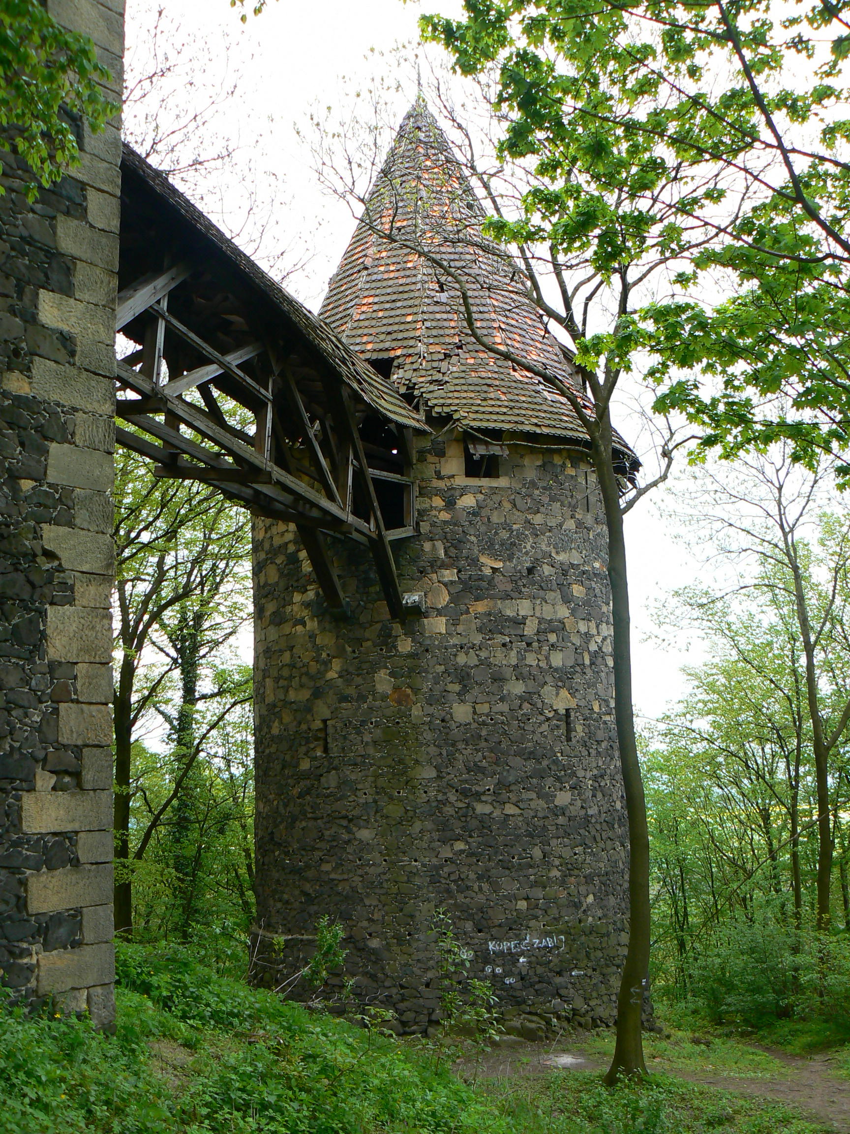 Zamek Grodziec – wiaża obronna.